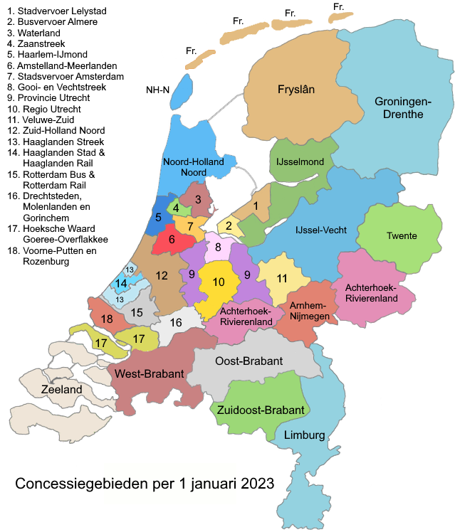 Concessiekaart van Nederland